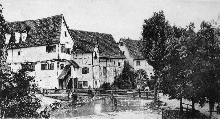 Rechts die Gipsmühle, in der Mitte eine Scheune und links im Vordergrund der 1908 abgebrannte Spittel von Mössingen